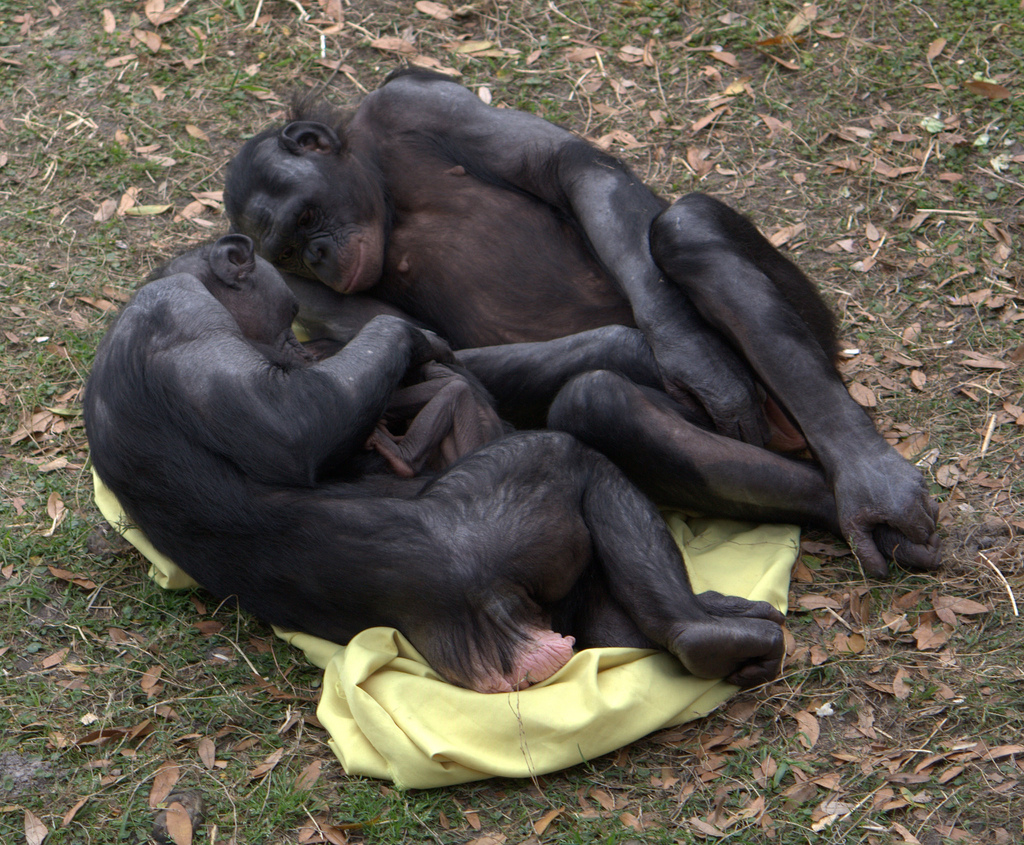 Bonobos adoring baby